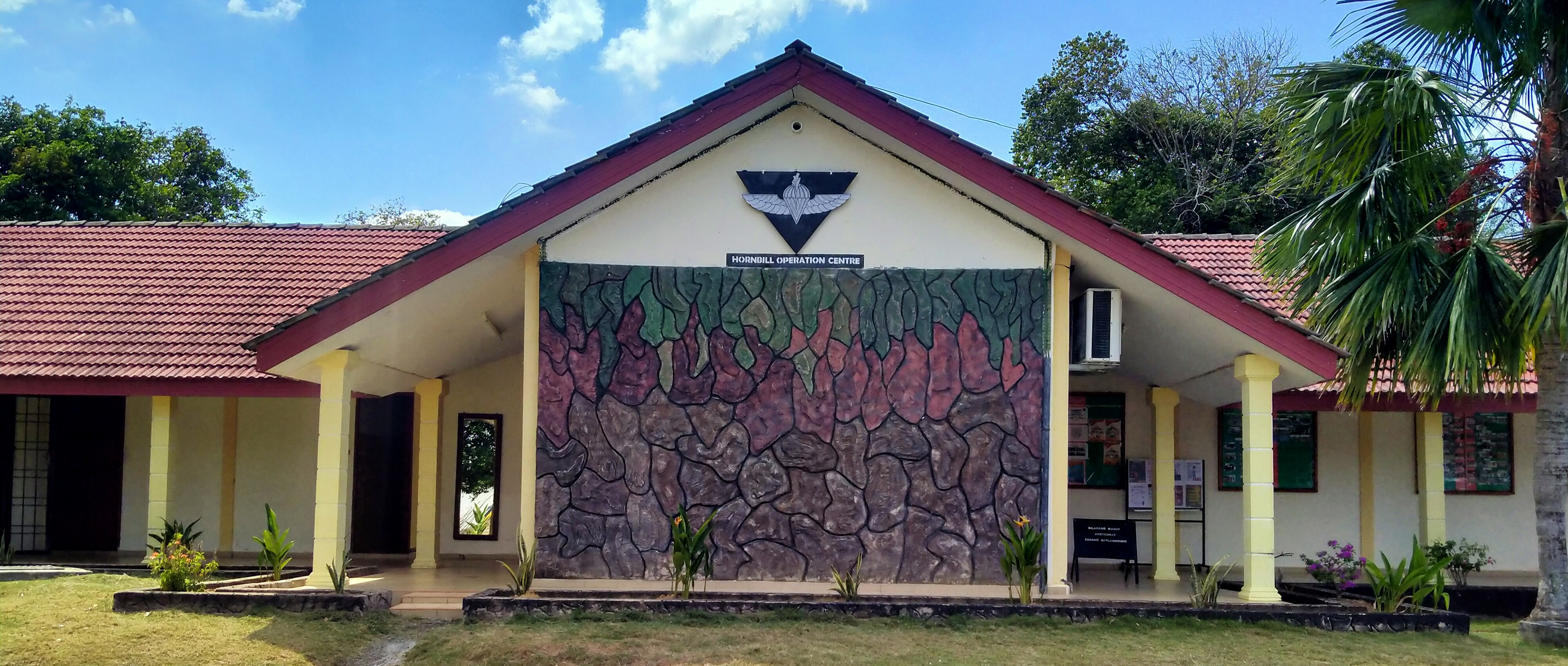 Dewan Mesyuarat